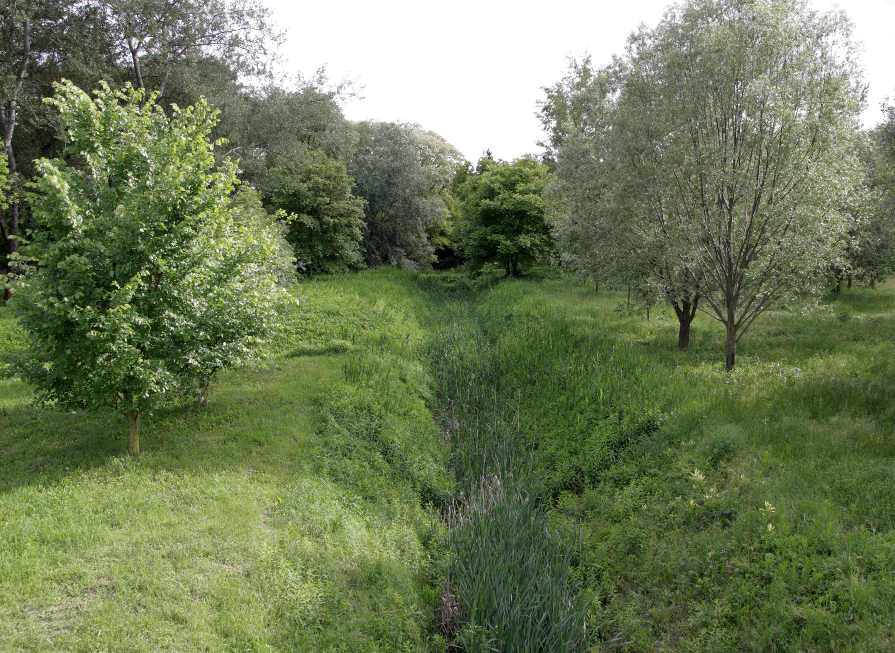 Štinkovka mezi Předním a Zadním rybníkem, Hustopeče.